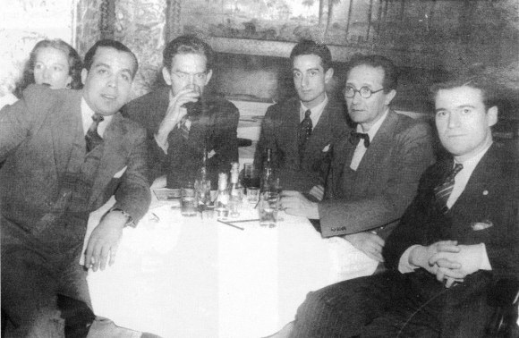 Ernesto Guerra da Cal (cun vaso na man) con Alfonso Daniel Rodríguez Castelao nunha reunión con amigos en New York